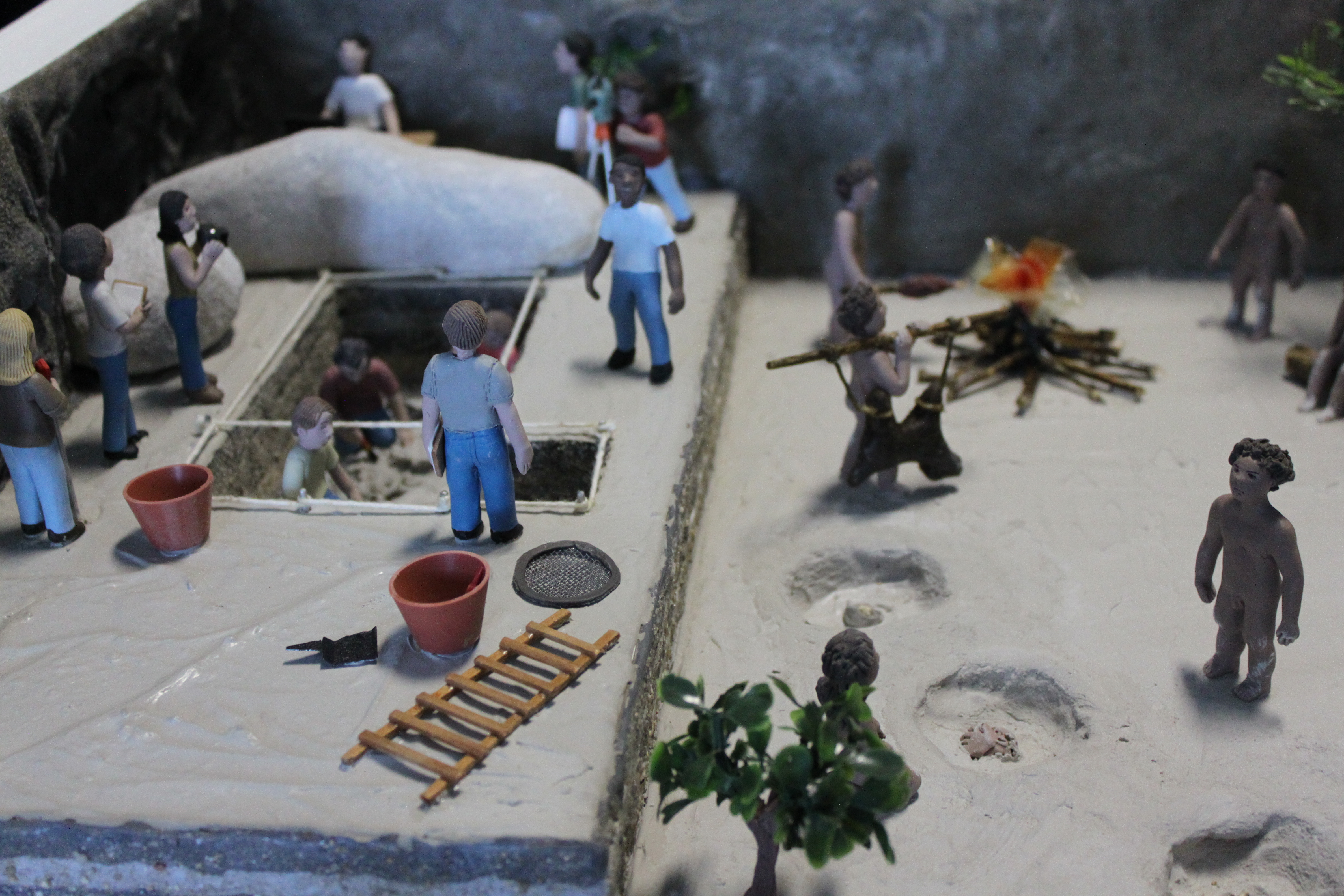 Lapa do Santo - Educativo - Exposição 'Morte e vida na Lapa do Santo' no Centro de Arqueologia Annette Laming-Emperaire, coordenado pela arqueóloga Rosângela Albano e Cleito Ribeiro, no município de Lagoa Santa, Minas Gerais. Sob curadoria de André Strauss e Rodrigo Elias de Oliveira essa exposição é a primeira a mostrar ao grande público o material arqueológico encontrado na Lapa do Santo. Um destaque é que a exposição terá inúmeras peças produzidas através de impressão 3D. Também fará parte da exposição maquetes táteis e fotos do renomado Maurício de Paiva. Nesta imagem observa-se uma das maquetes que compõe a exposição.